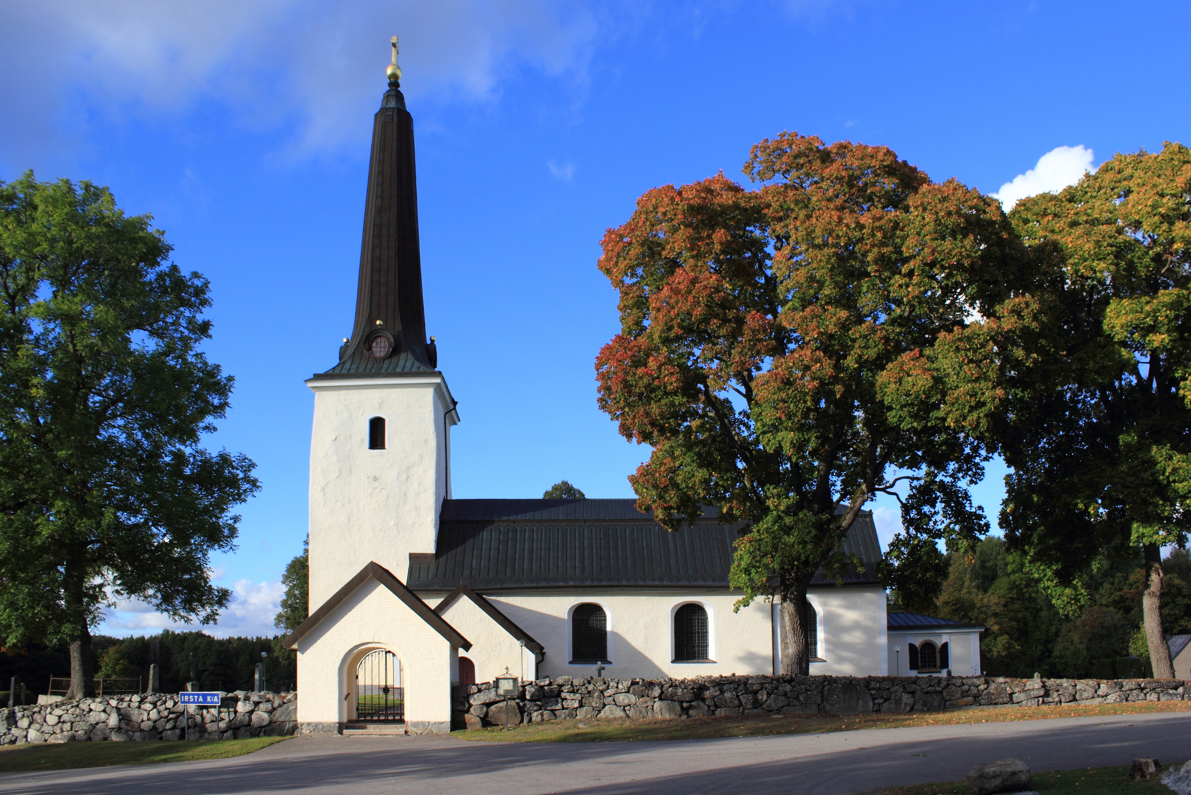 Irsta kyrka